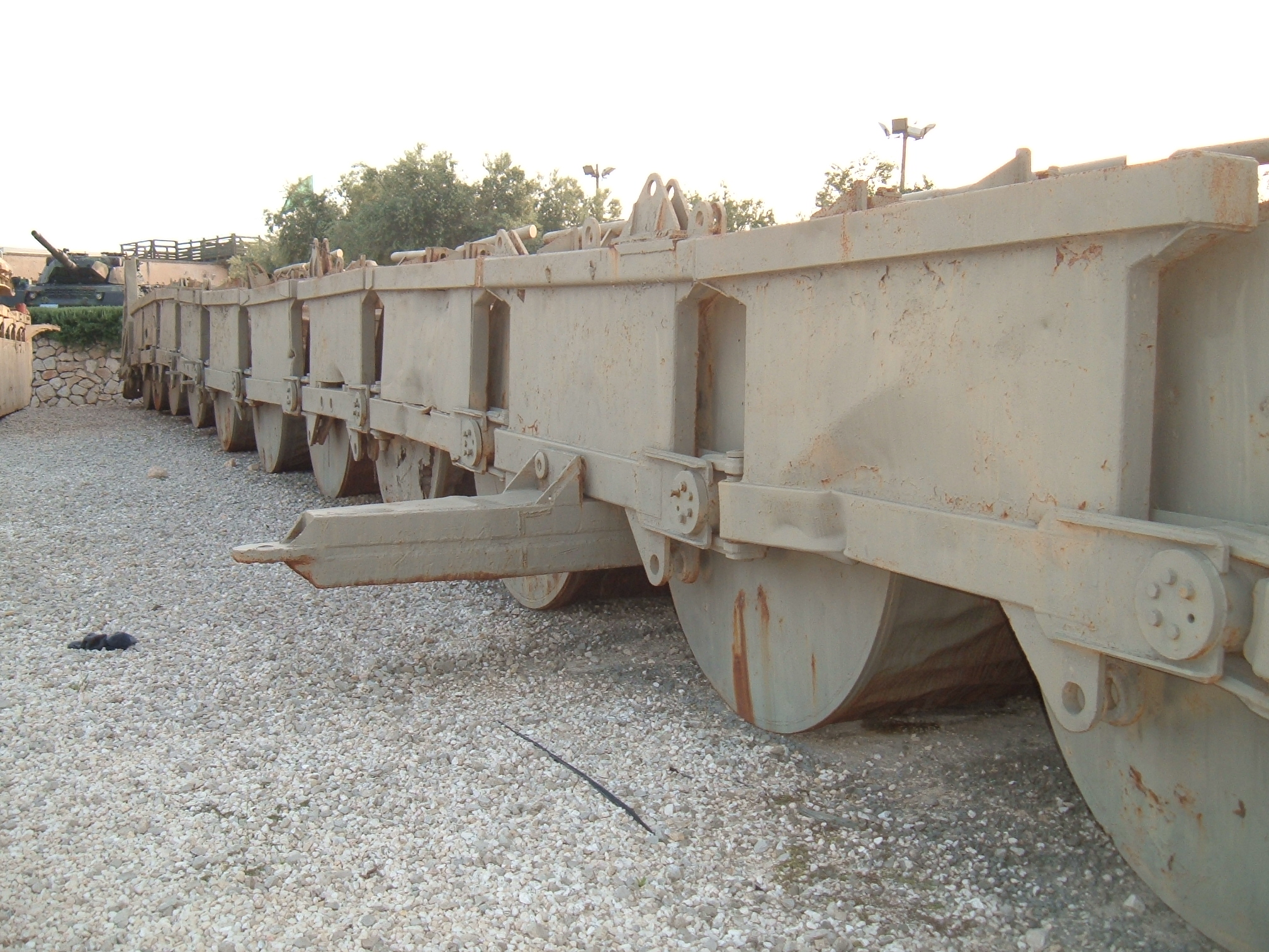 Glilim bridge.